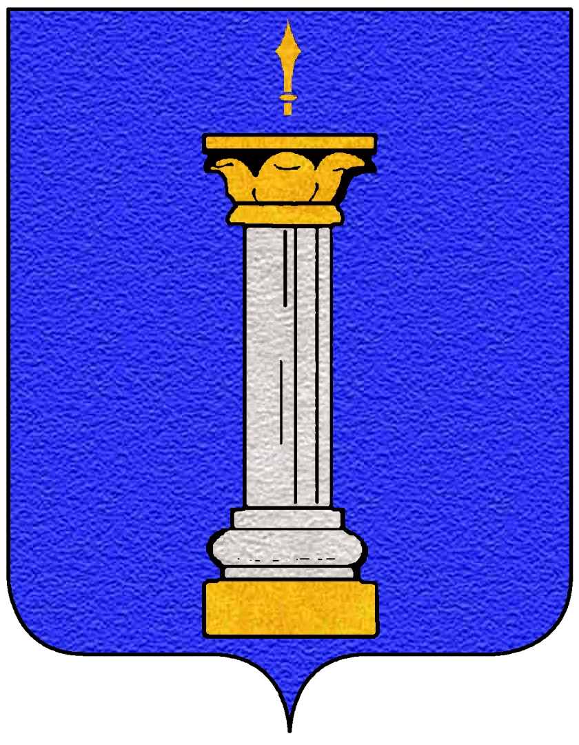 Stemma della famiglia Colonna